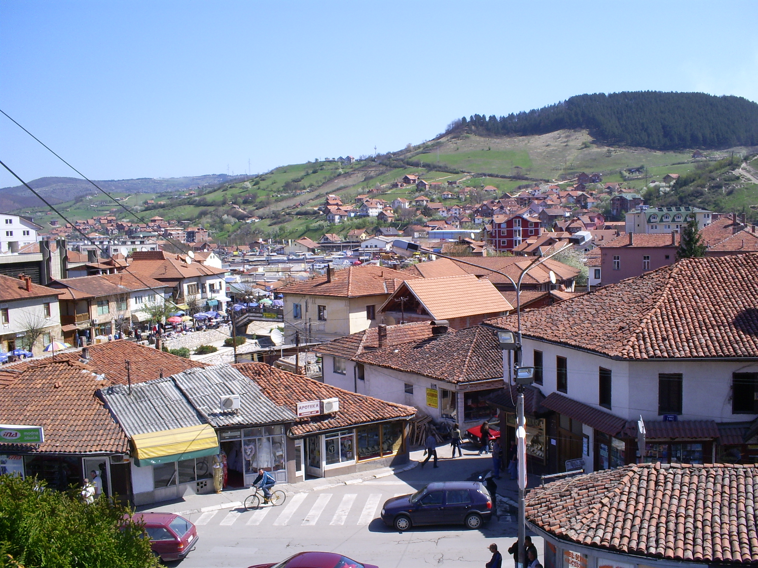 Pogled na Novi Pazar sa utvrdjenja u centru grada